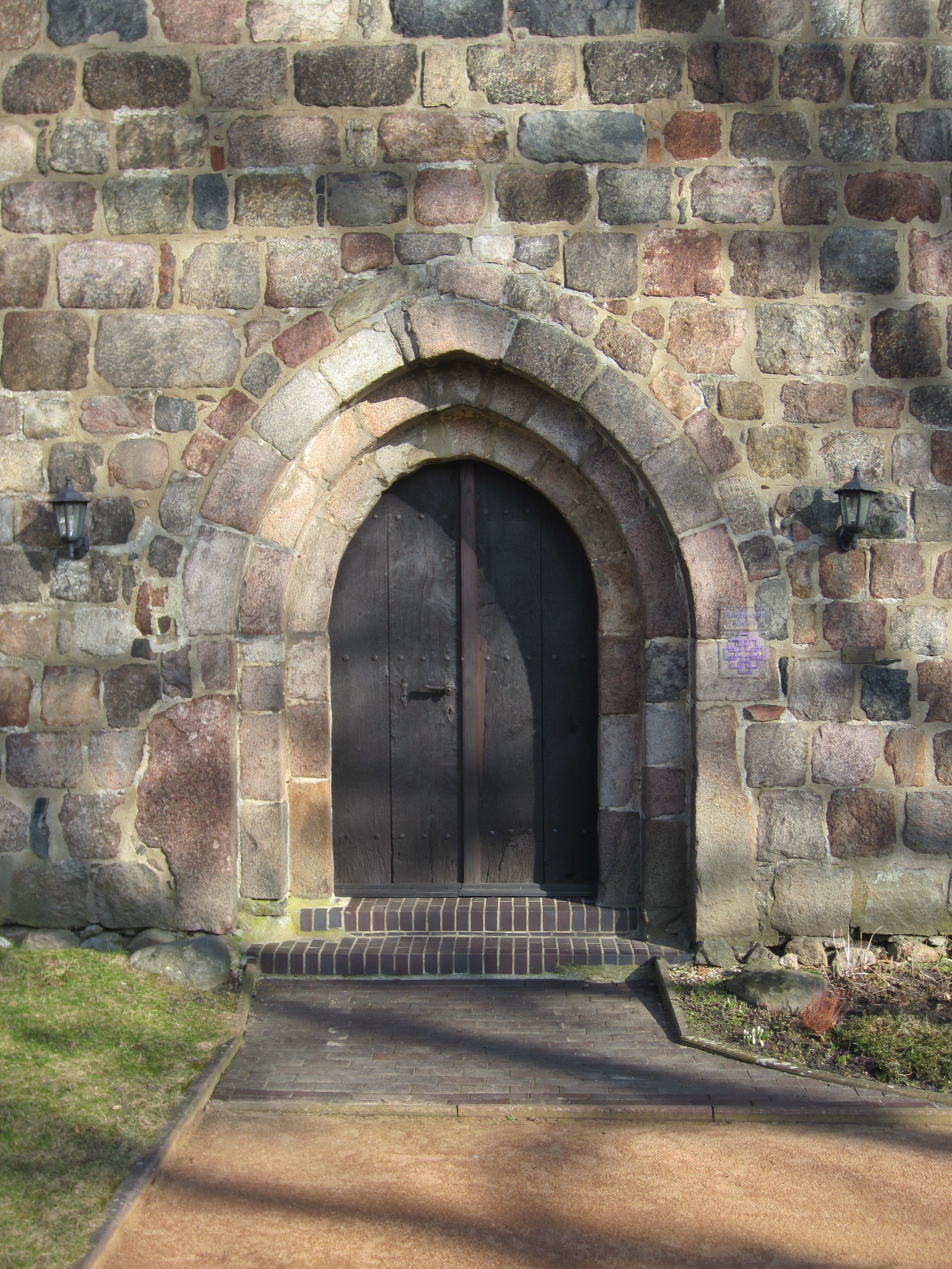 Massen, Gemeinde Massen-Niederlausitz, denkmalgeschützte Dorfkirche, Westportal